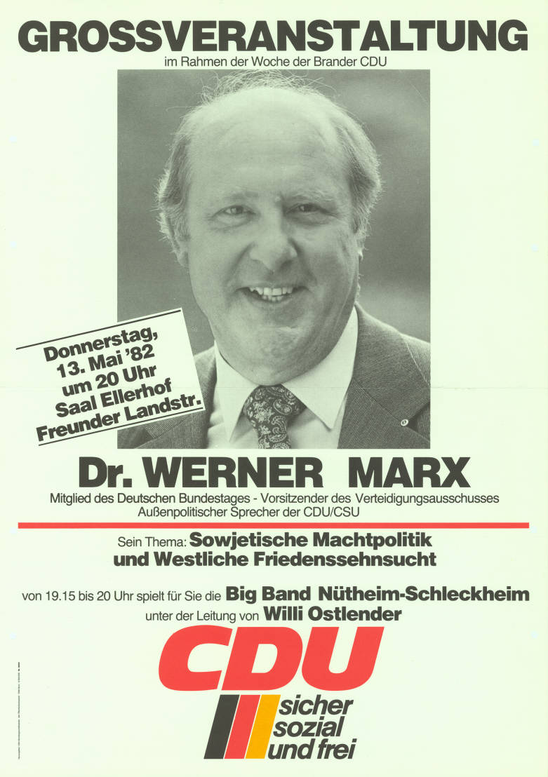 Grossveranstaltung im Rahmen der Woche der Brander CDU ... Dr. Werner Marx Mitglied des Deutschen Bundestages - Vorsitzender des Verteidigungsausschusses Außenpolitischer Sprecher der CDU/CSU Sein Thema: Sowjetische Machtpolitik und westliche Friedenssehnsucht ... CDU sicher sozial und frei Plakatart: Ankündigungsplakat Auftraggeber: CDU-Bundesgeschäftsstelle, Abt. Öffentlichkeitsarbeit, Bonn Objekt-Signatur: 10-031 : 506 Bestand: CDU-Plakate (10-031) GliederungBestand10-18: CDU-Plakate (10-031) » Ankündigungsplakate » ab 1980 Lizenz: KAS/ACDP 10-031 : 506 CC-BY-SA 3.0 DE